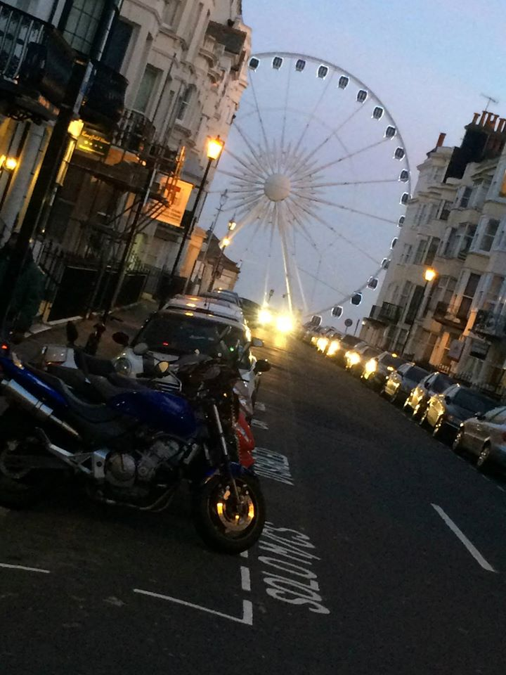 Město Brighton patří mezi anglická letoviska, toto je ulice vedoucí mezi hotely až k vyhlídkovému molu.